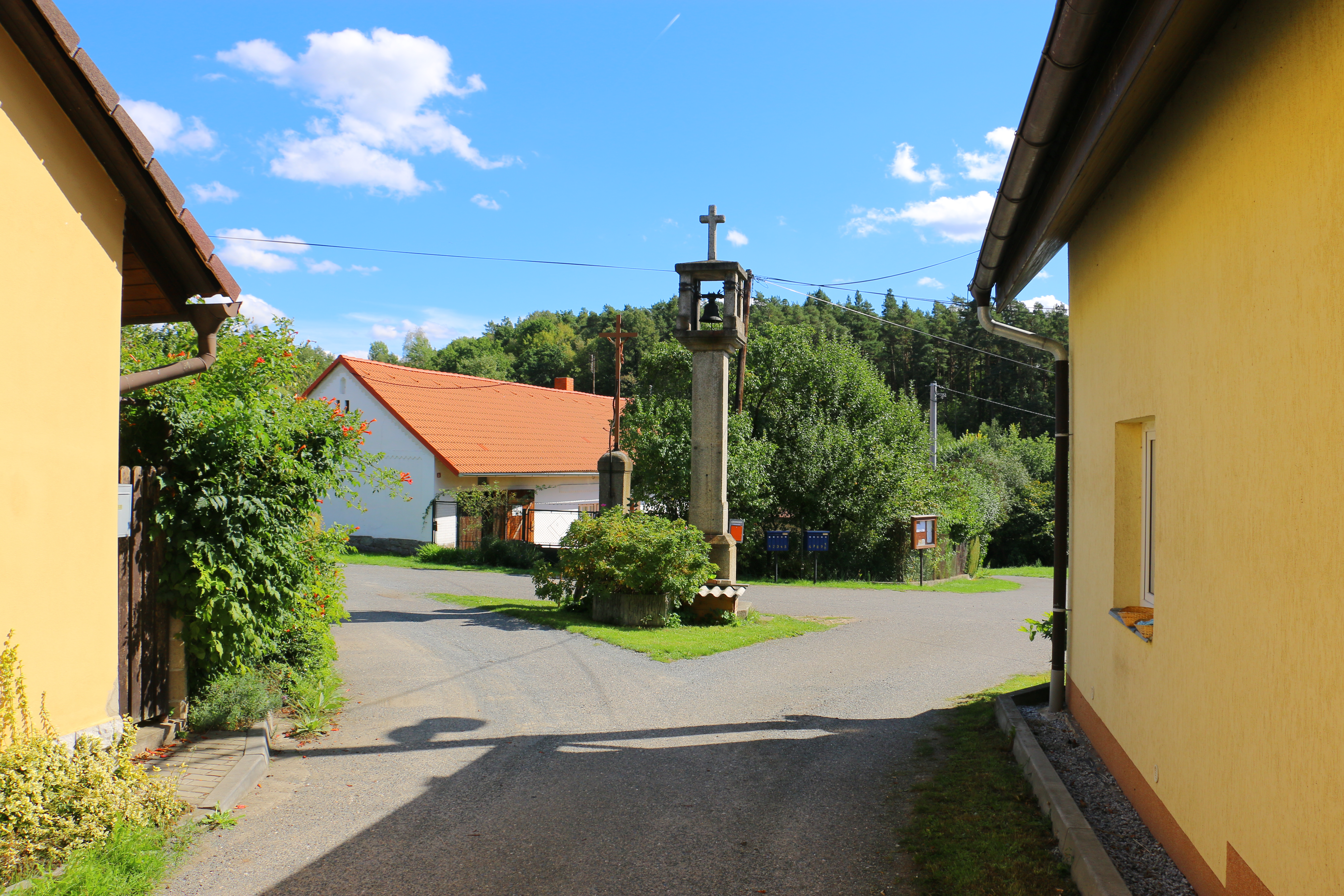 Bořená Hora, okres Benešov, zvonička Project: Fotíme Česko.